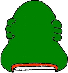 Glifo de San Salvador, Hidalgo